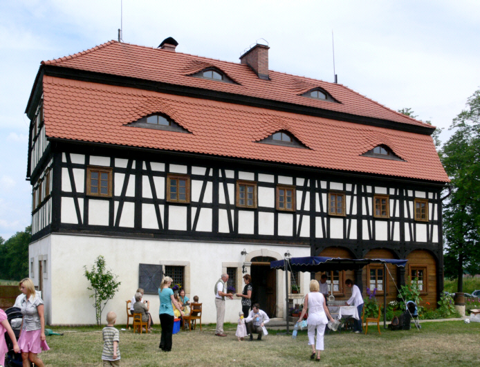 „Dom Kołodzieja” (Stellmacherhaus), Aleje Lipowe 1, Zgorzelec; 2005 hierher umgesetztes Umgebindehaus